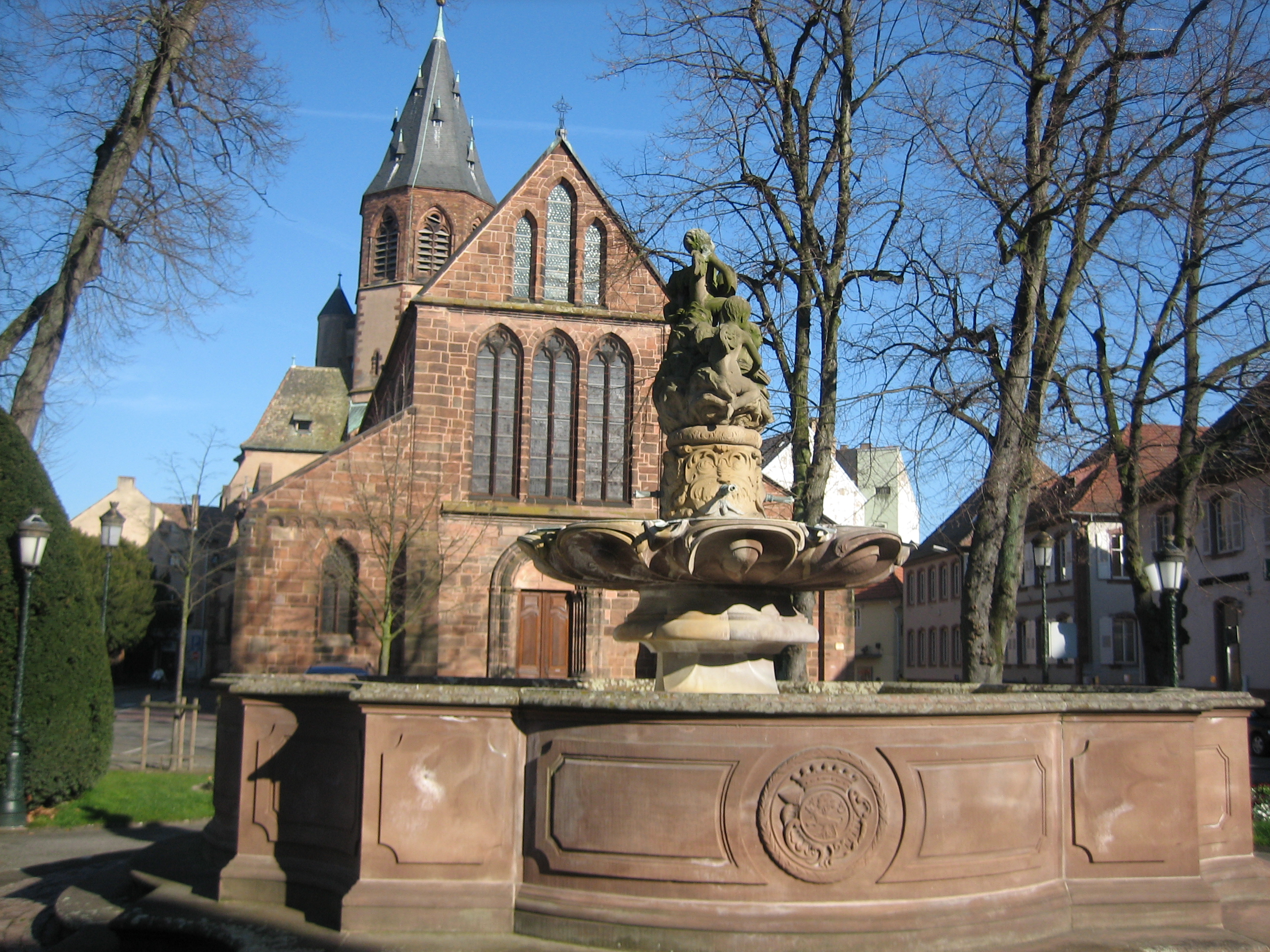 Église Saint-Georges à Haguenau (France), en face la Fontaine aux Abeilles, provenant de l'abbaye cistercienne de Neubourg, et classée Monument historique